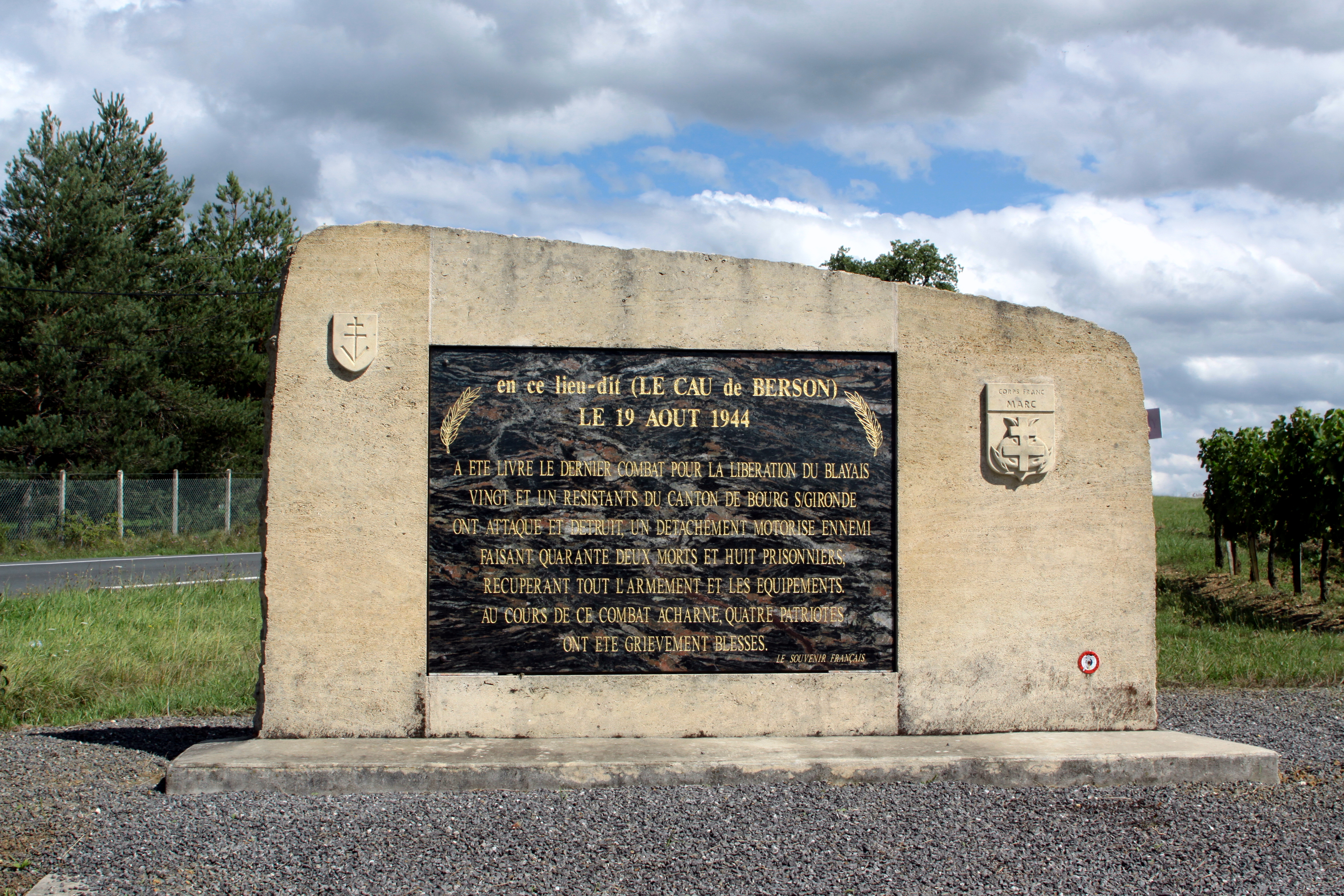 Resistentmonument um Cau de Berson